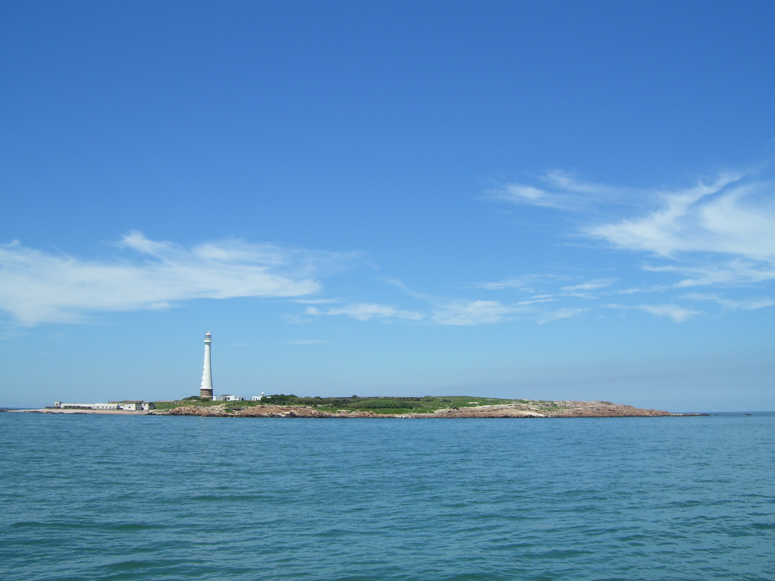 Isla de Lobos vista desde su cara N, frente a Punta del Este, en Uruguay.